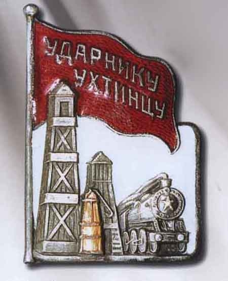 4 апреля 1936 г Президиум ЦИК СССР учредил нагрудный знак "Ударнику-ухтинцу", которым отмечался "стахановский труд при освоении северных территорий республики Коми". В числе прочих, знаком награждались заключенные и сотрудники НКВД.